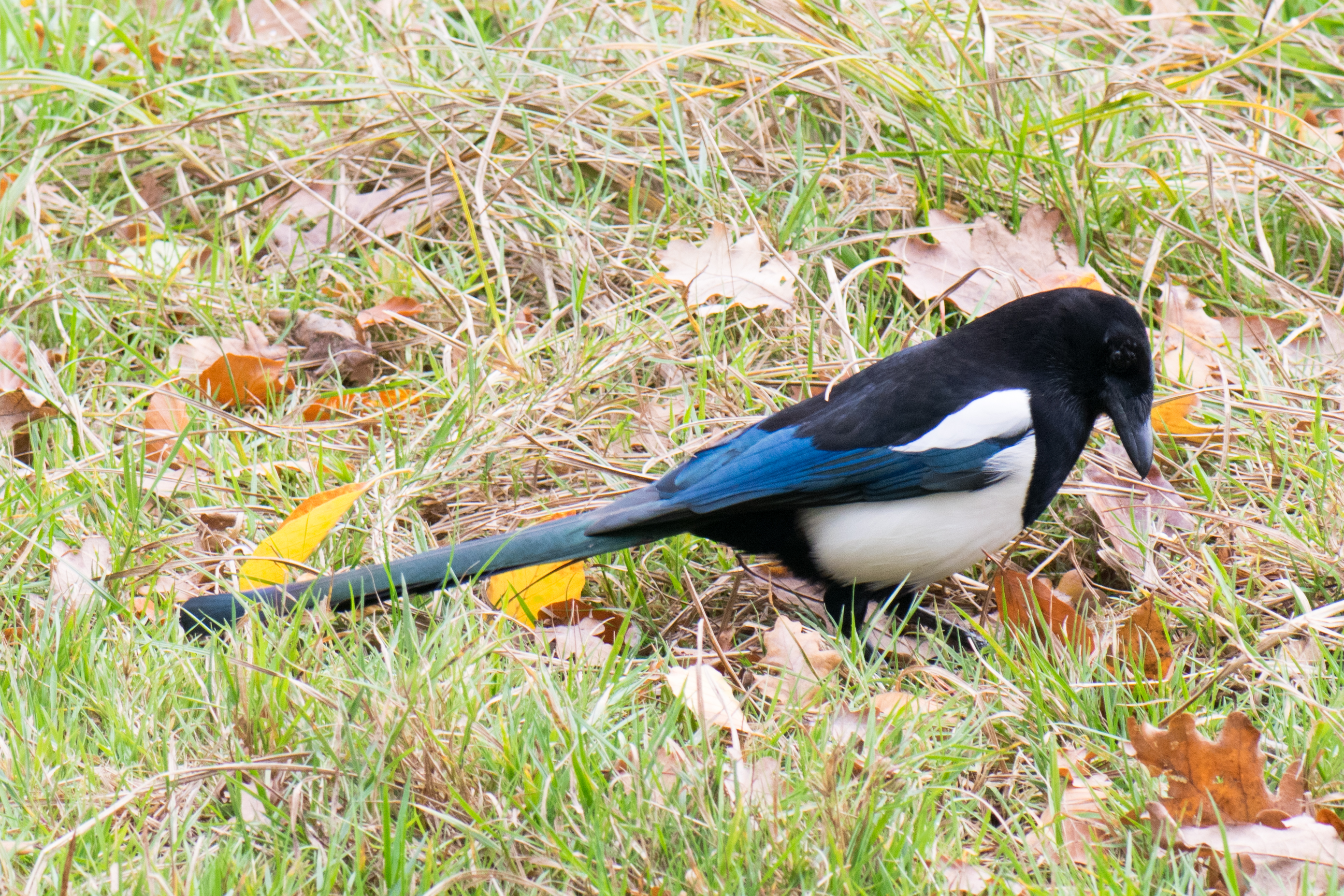 London, 2017